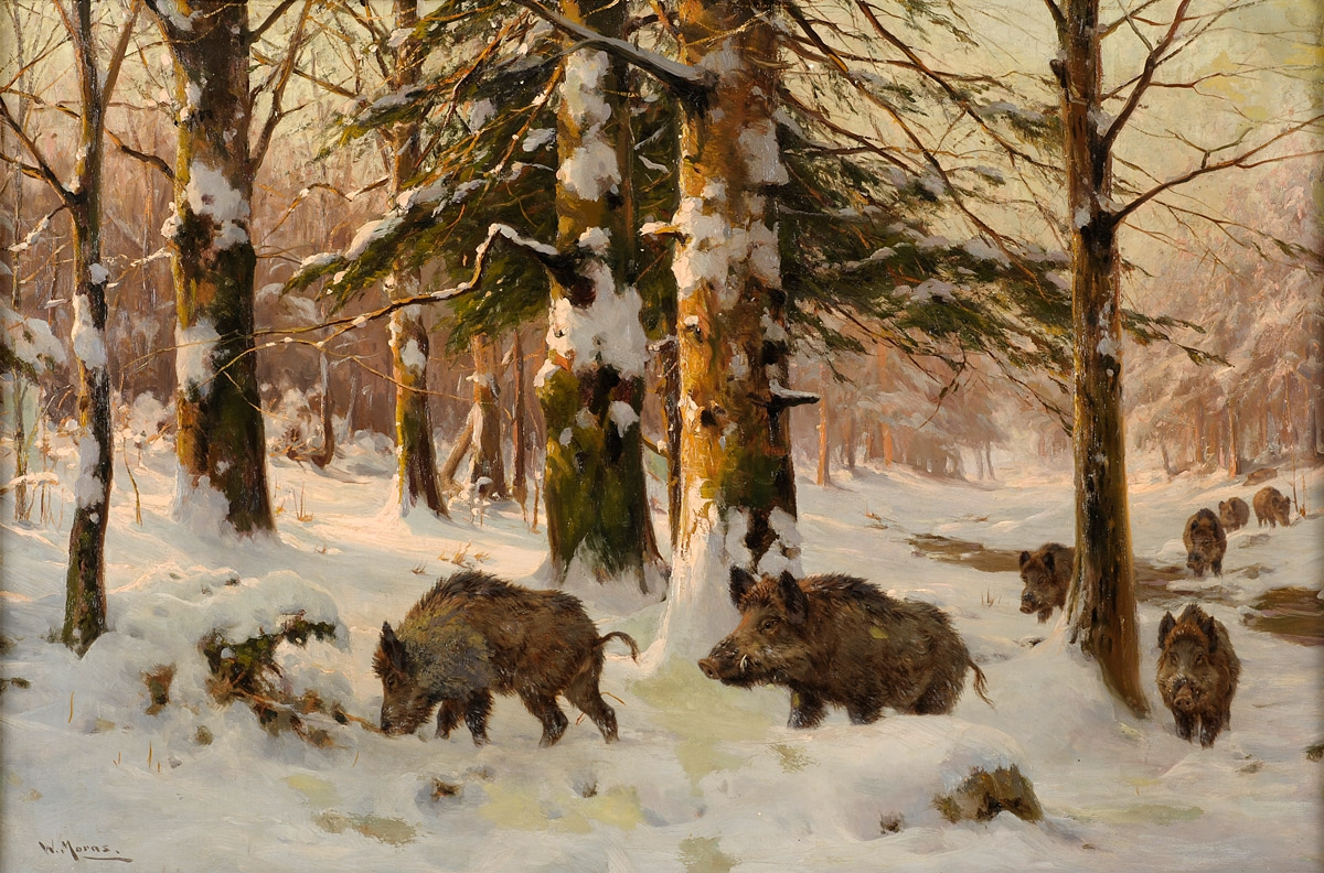 Schwarzwild im Winterwald.